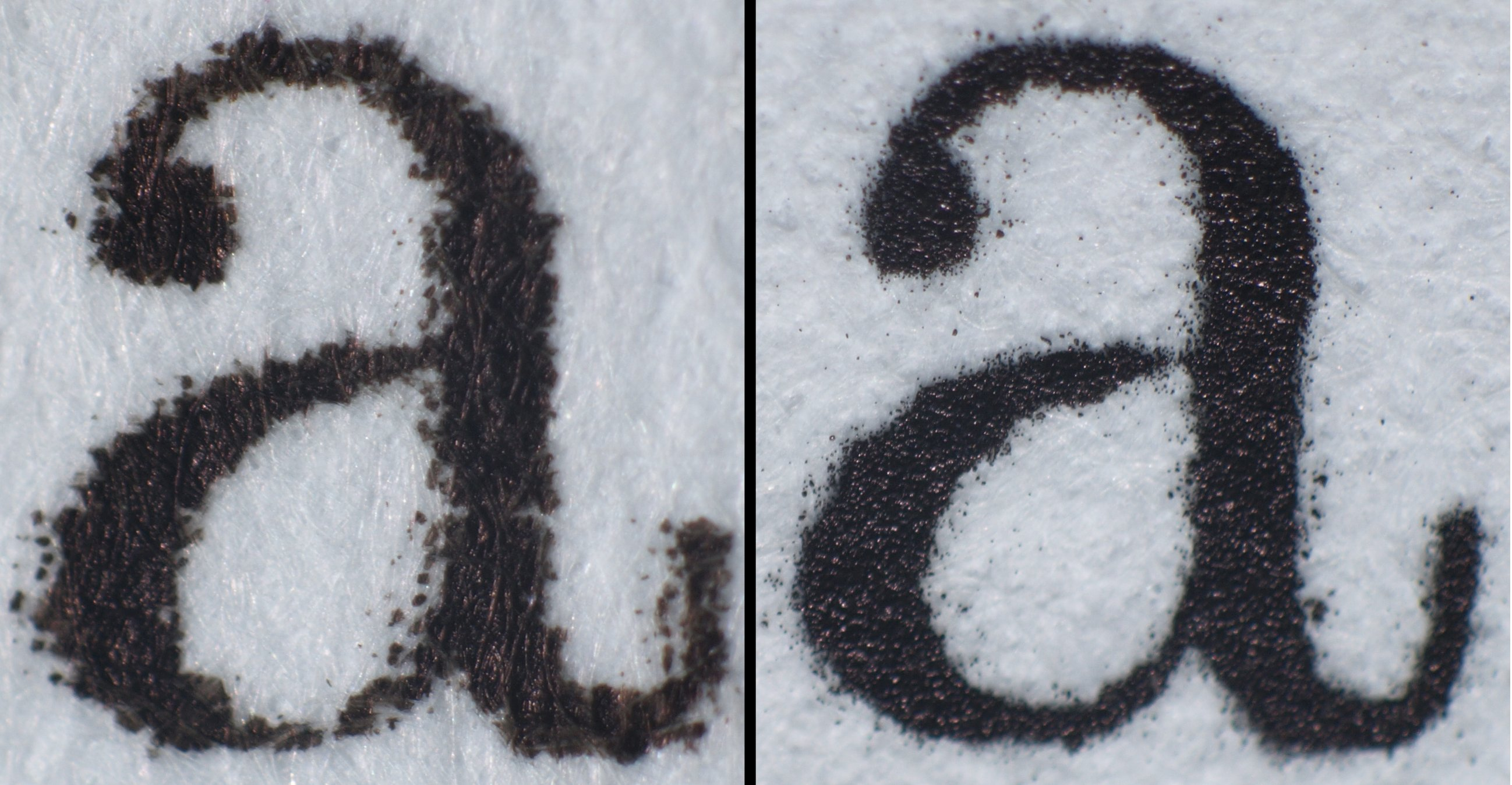 Links Ausdruck eines Tintenstrahldruckers, rechts der eines Laserdruckers